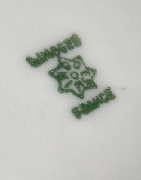 Marque de fabrique Porcelaine de Limoges au dos d'une assiette